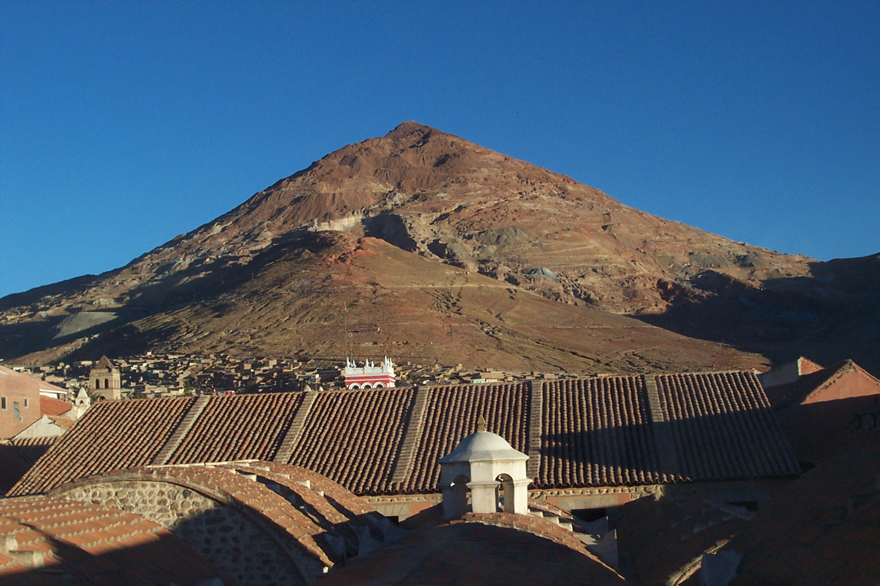 Cerro Ricco bij Potosi, Bolivia.